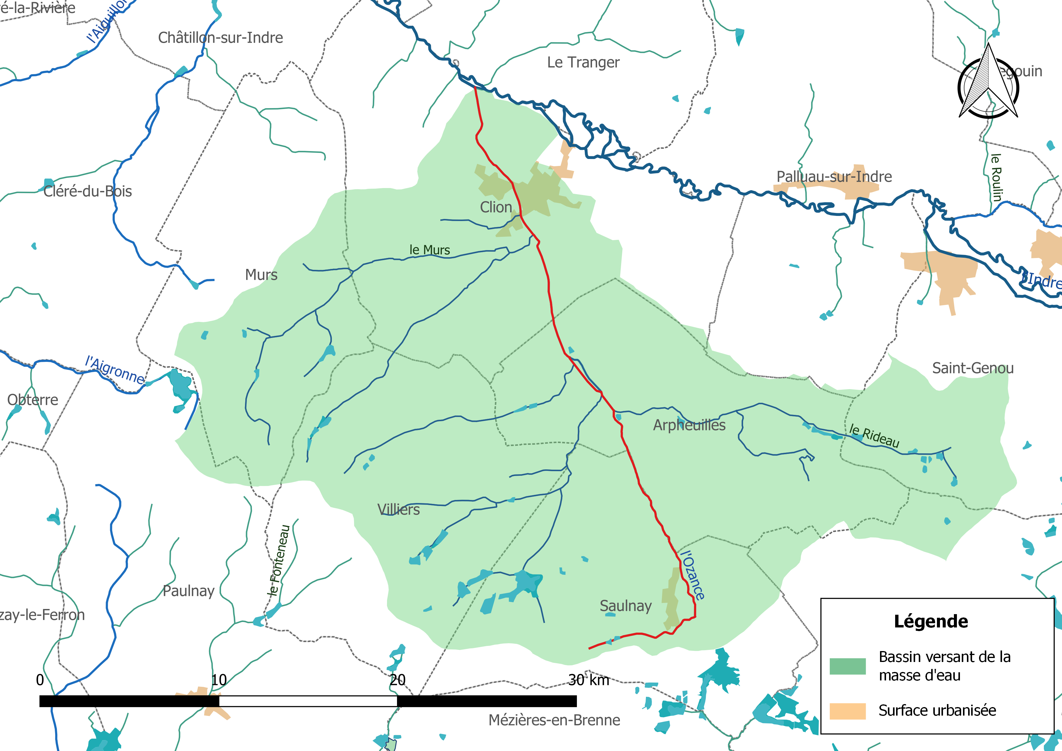 Carte de la masse d'eau « FRGR2032 », avec mise en exergue du cours d'eau « l'Ozance » (en rouge).